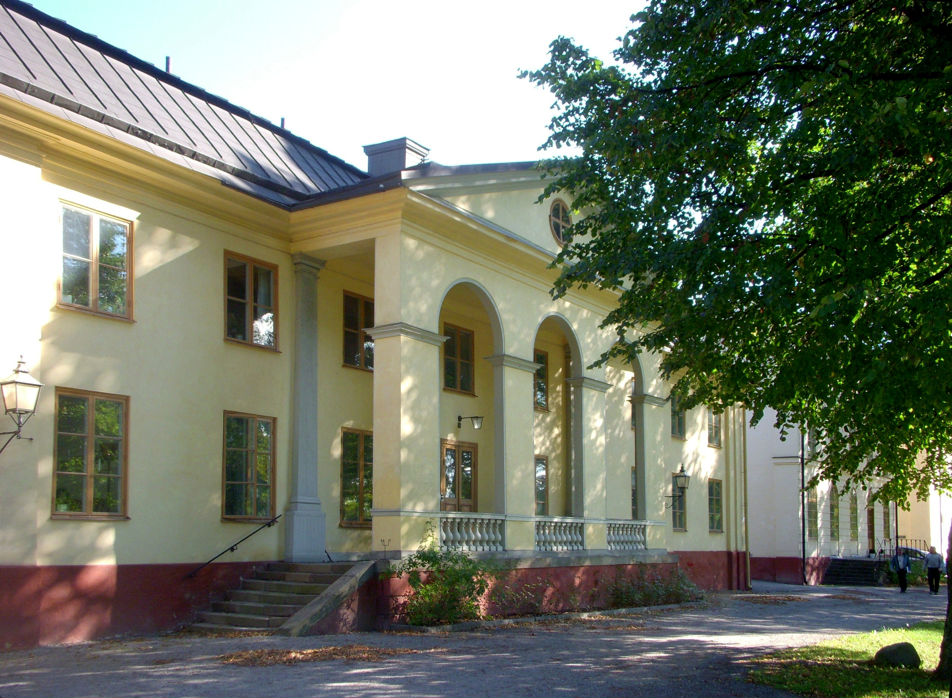 Långa raden 4 på Drottningholmsmalen "Kanslihuset"